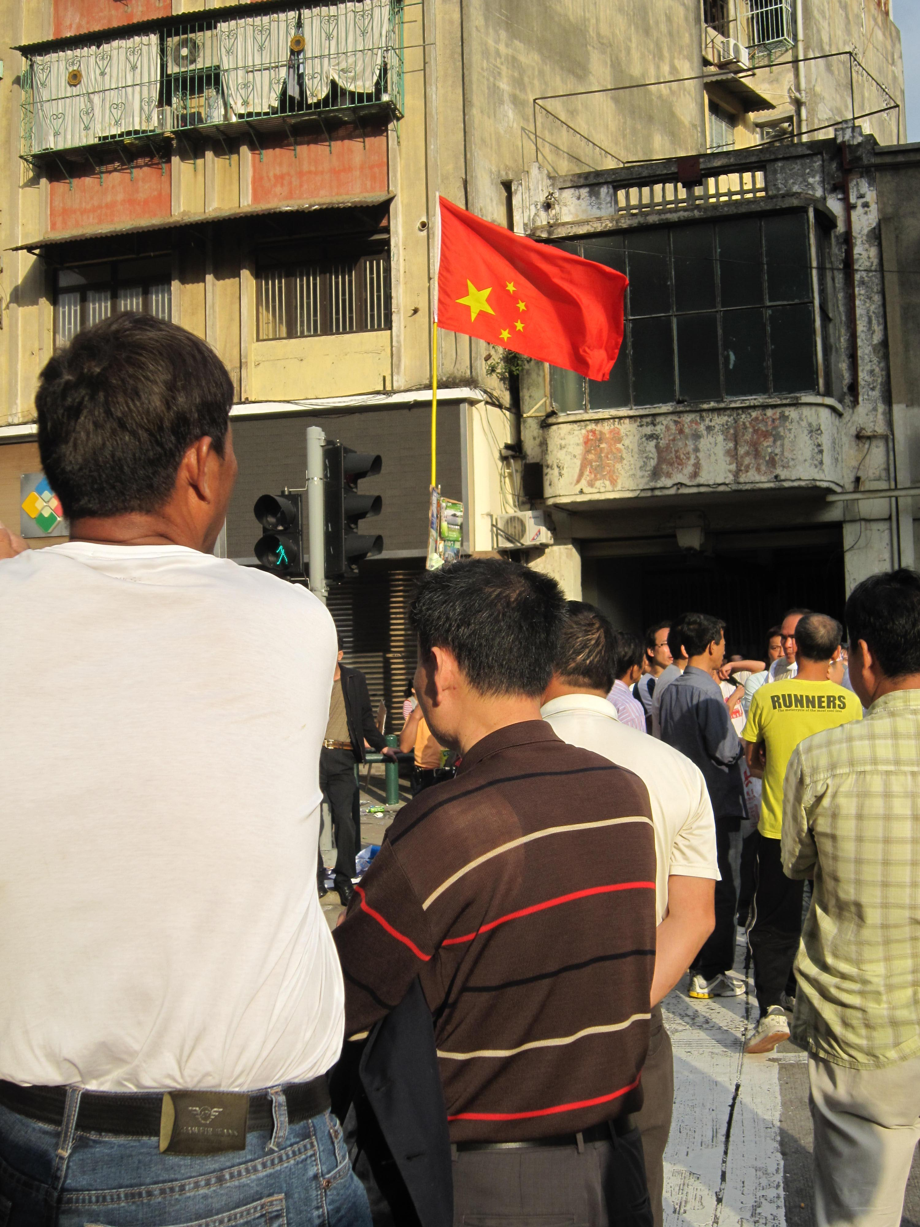 Procissão em Macau em 1 de Maio de 2010